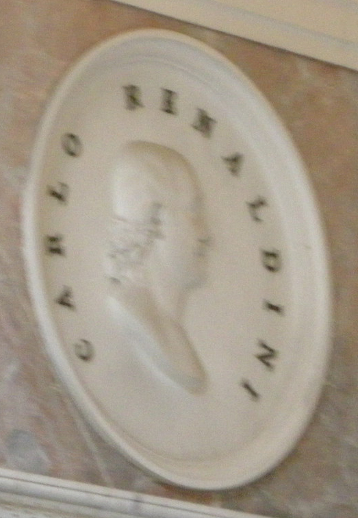 Tribuna, medaglione di carlo renaldini